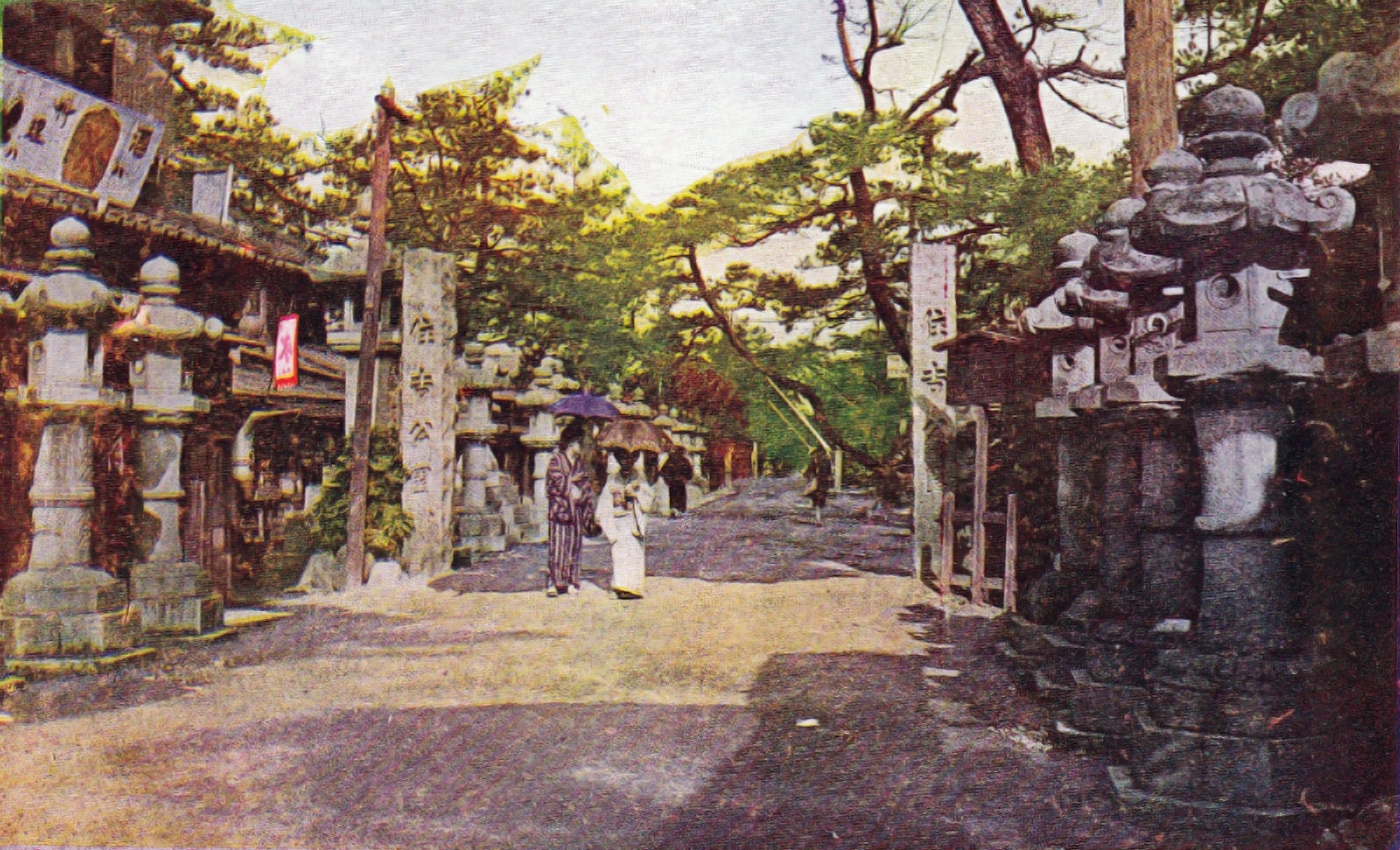 明治末か大正時代の住吉公園の西入口。